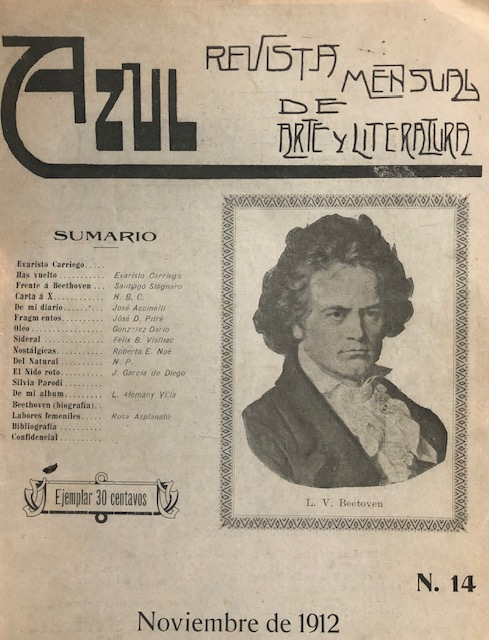 Revista Azul Nº 14